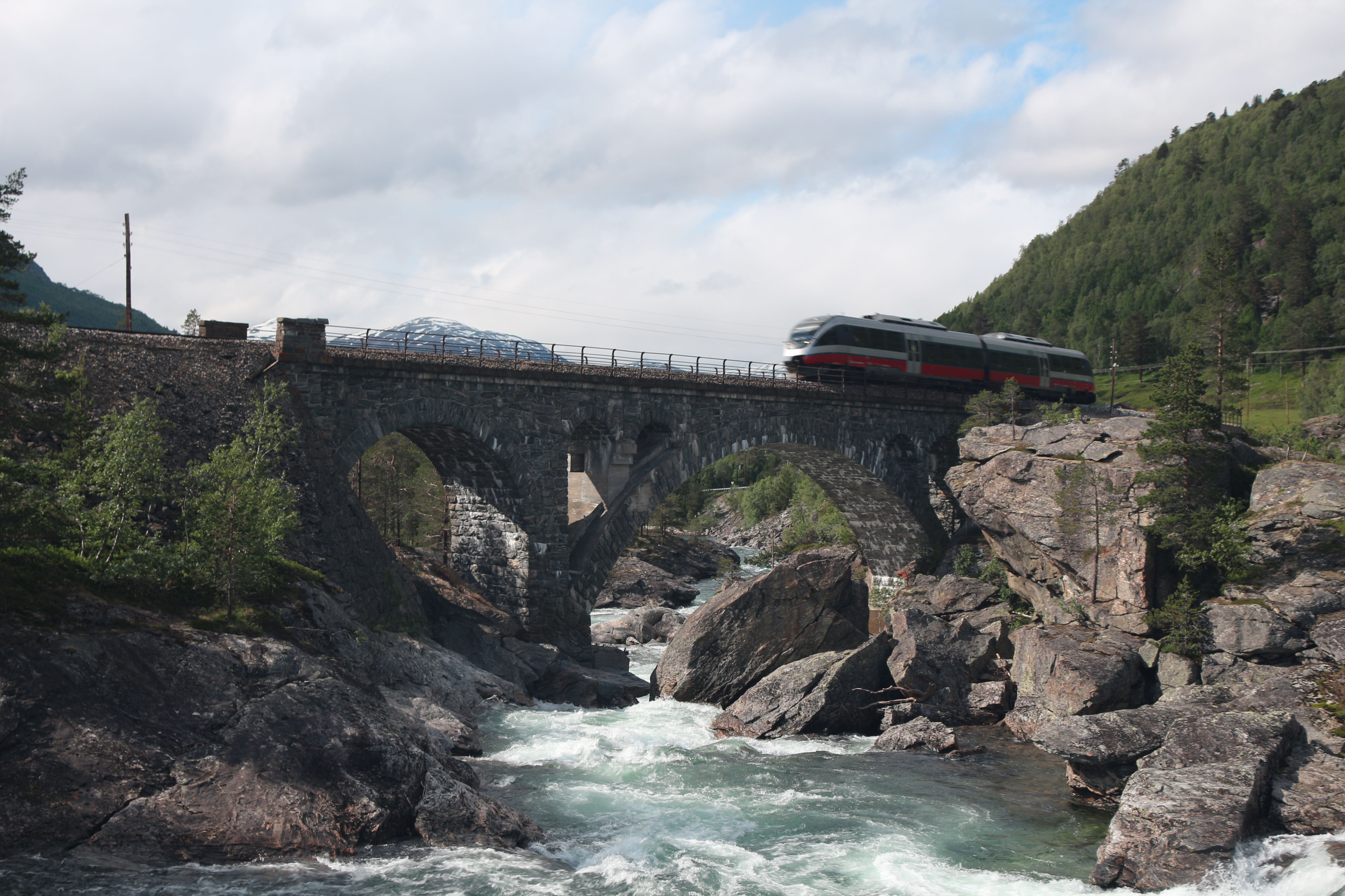 Stuguflåten bru